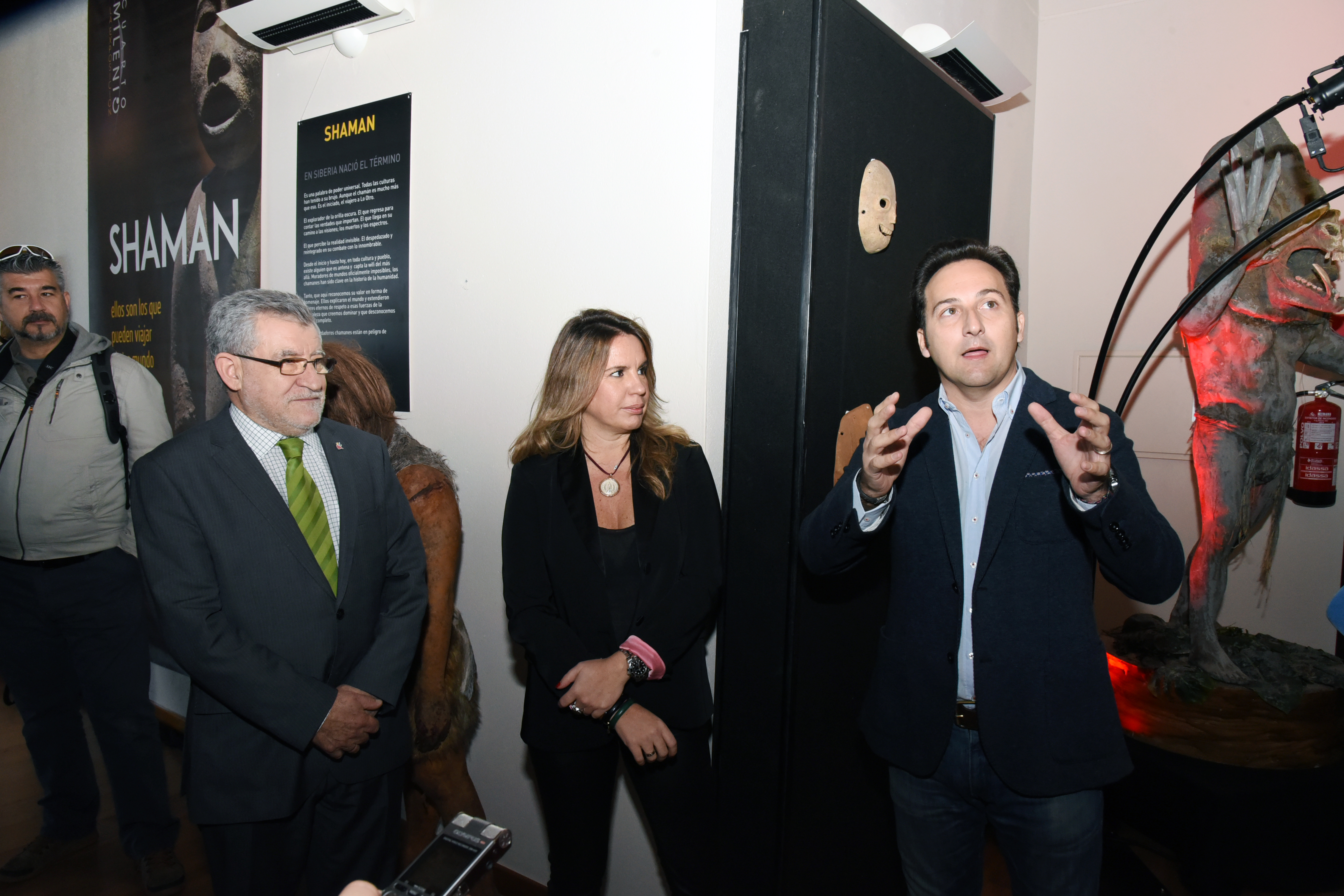 TOLEDO. 13-01-2017. El consejero Educación, Cultura y Deportes, Ángel Felpeto, inaugura la exposición ‘Cuarto milenio’, en el Museo de Santa Cruz.(Fotos: José Ramón Márquez//JCCM)